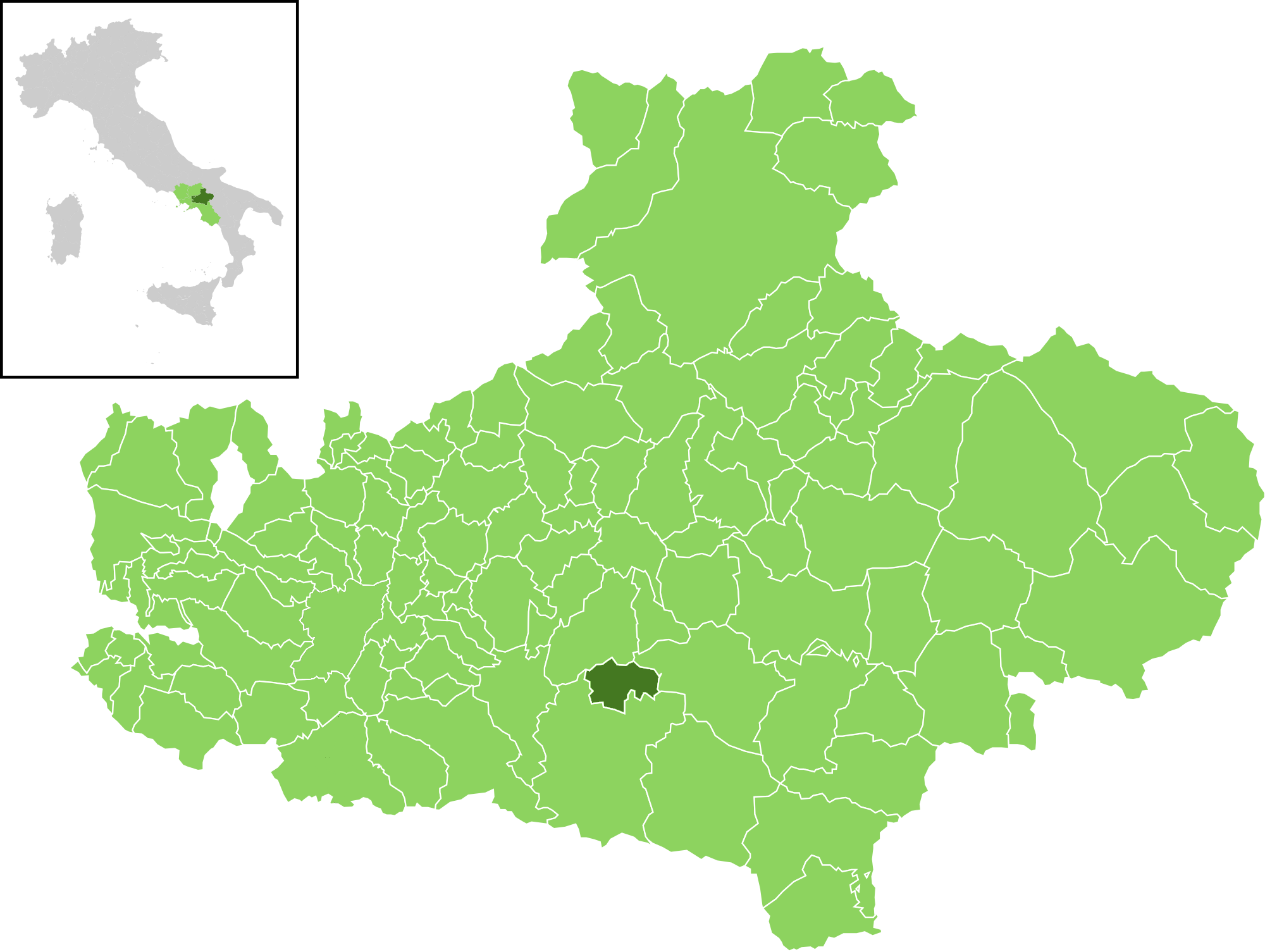 Il comune all'interno della provincia di Avellino